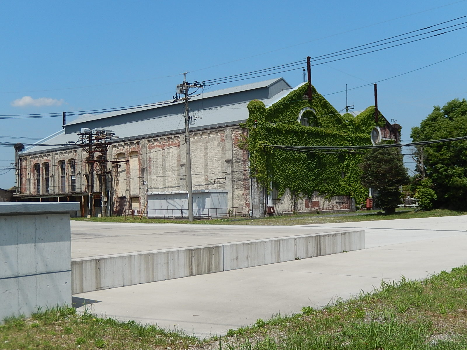 世界遺産推薦物件「明治日本の産業革命遺産群」構成資産、八幡製鉄所遠賀川水源地ポンプ室／南東～